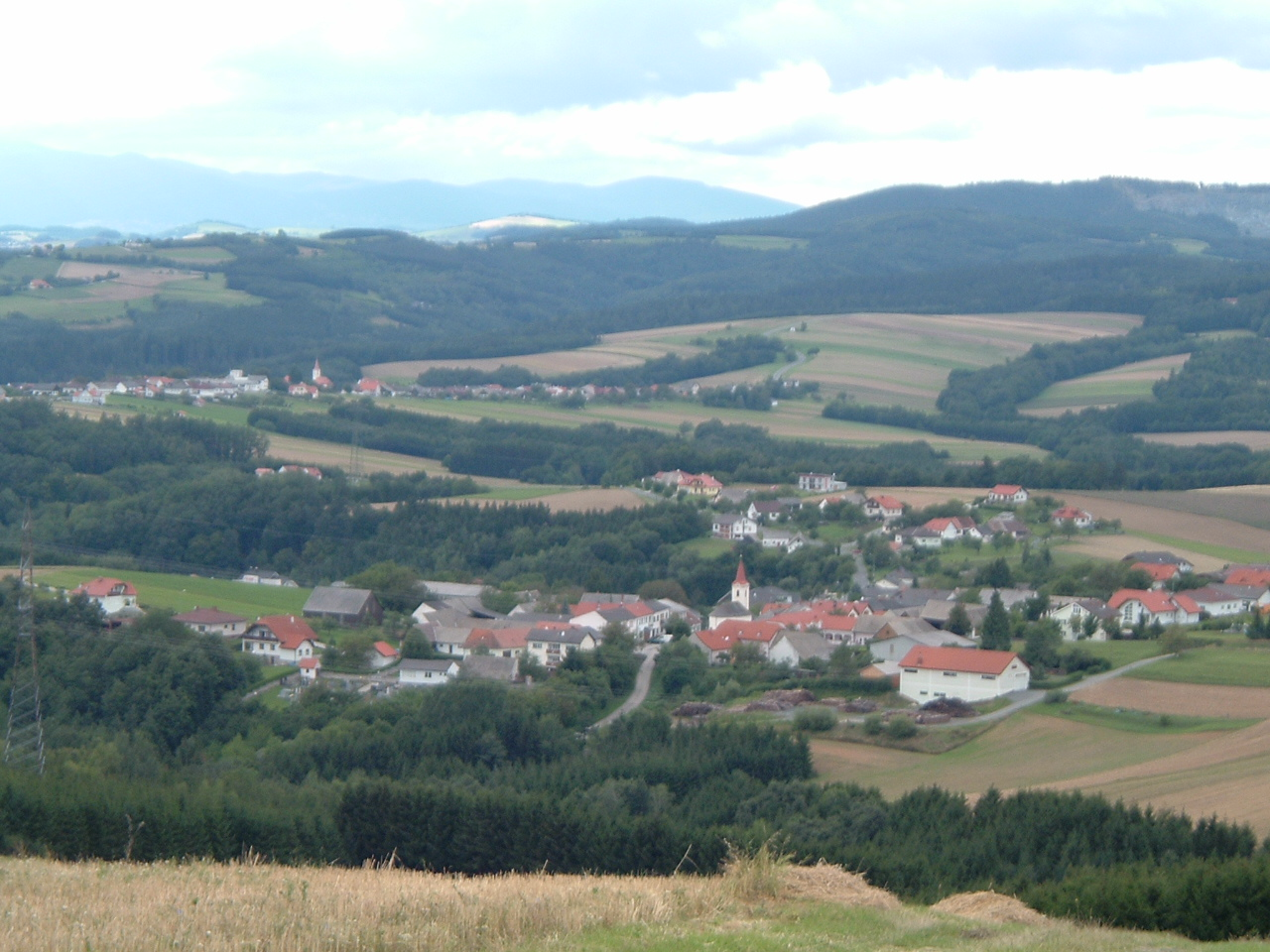 Unterkohlstätten, Burgenland, Austria